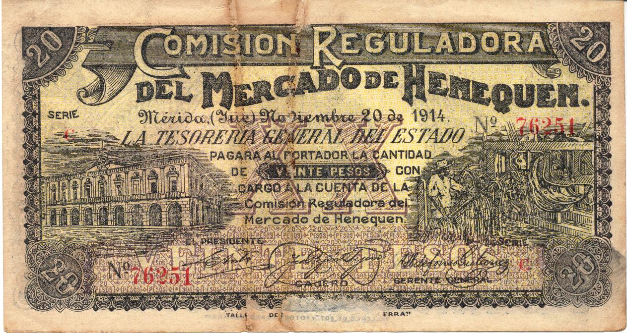 Billete que emitió el general golpista Abel Ortiz Argumedo en 1914 para "respaldar" los fondos con los que exaccionó a los industriales del henequén durante su breve mandato.